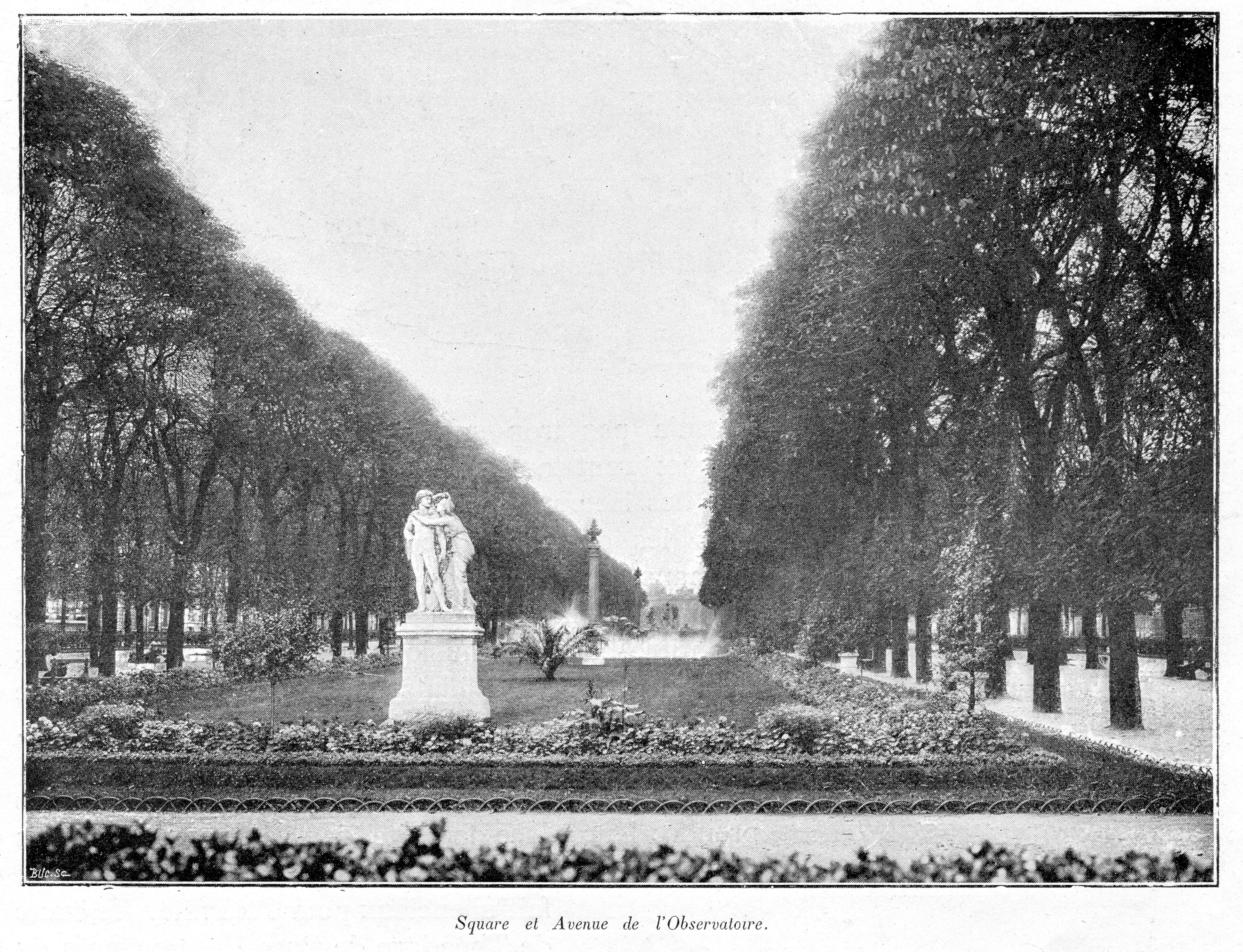 Clément Maurice Paris en plein air, BUC, 1897,Square et Avenue de l'Observatoire